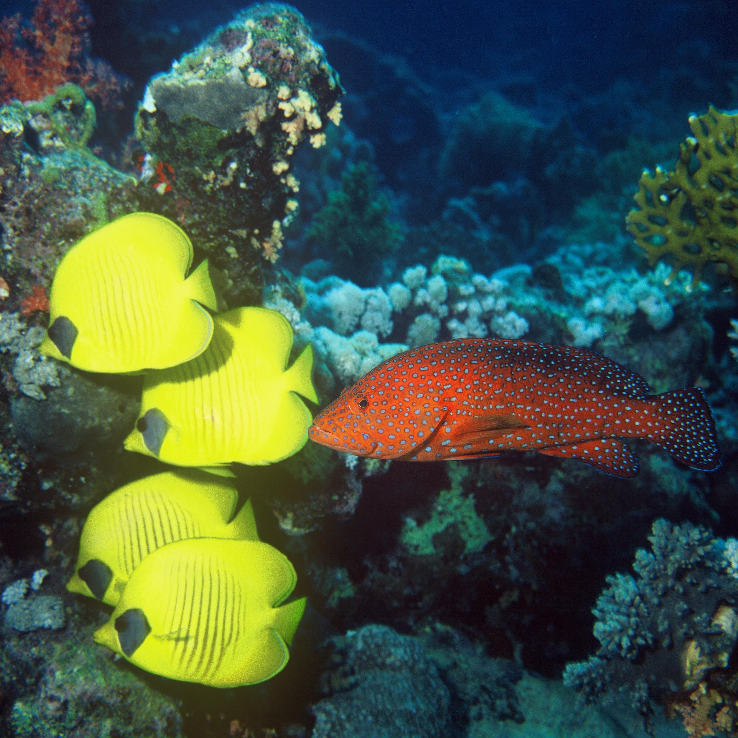 gele koraalvlinder (Chaetodon semilarvatus) Auteur: Albert Kok